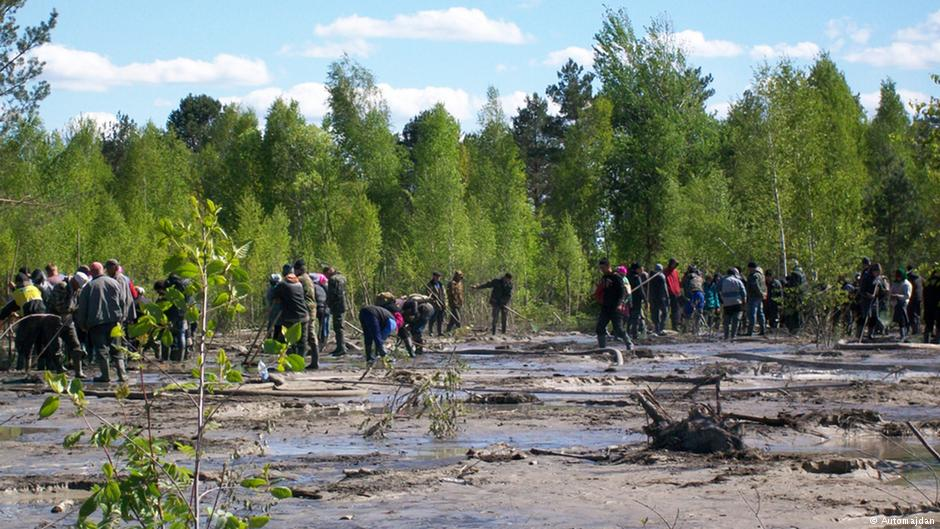 Нелегальний видобуток бурштину в Рівненській області (північні райони)